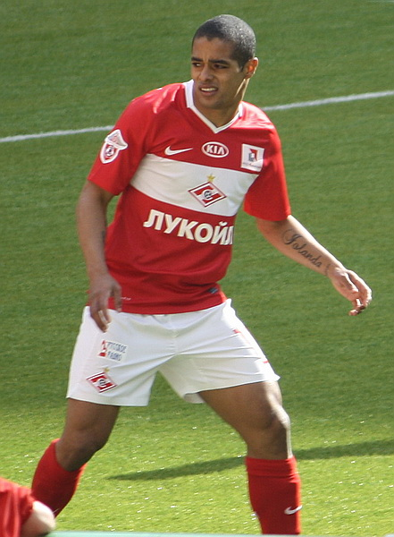 Welliton